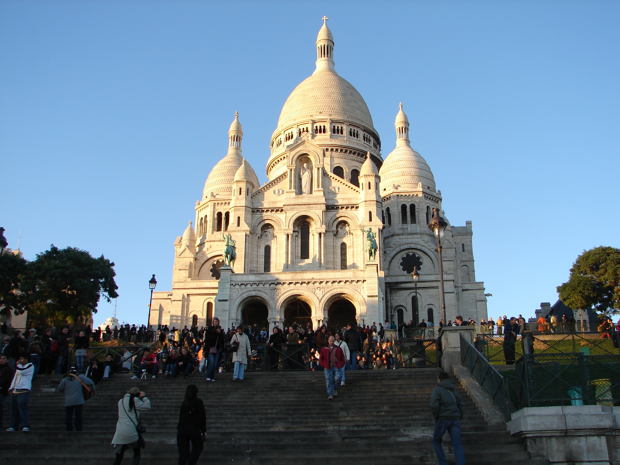 Basilique du Sacré-Coeur de Montmarte